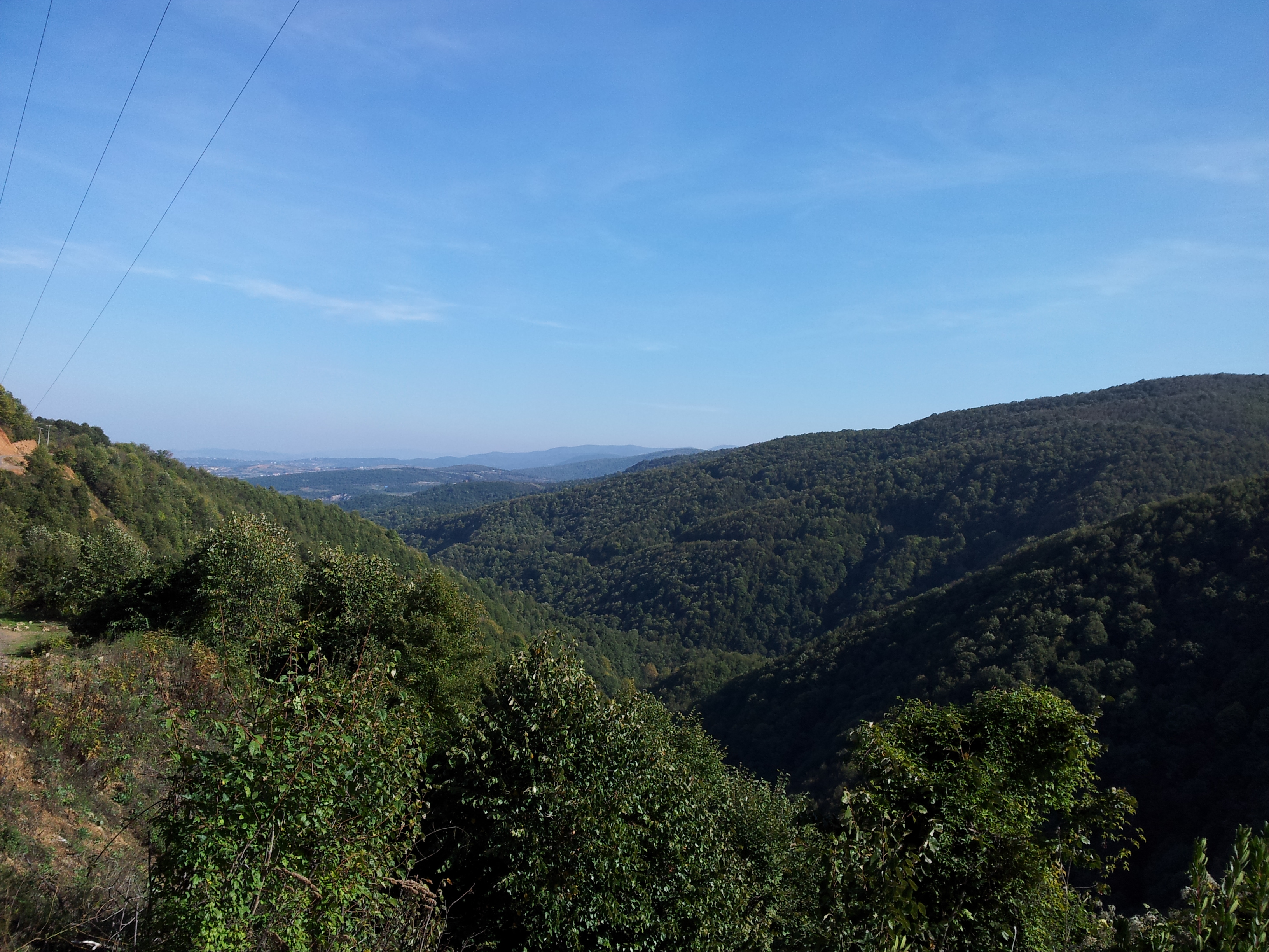 Üvezpınar, 77400 Termal/Yalova, Turkey